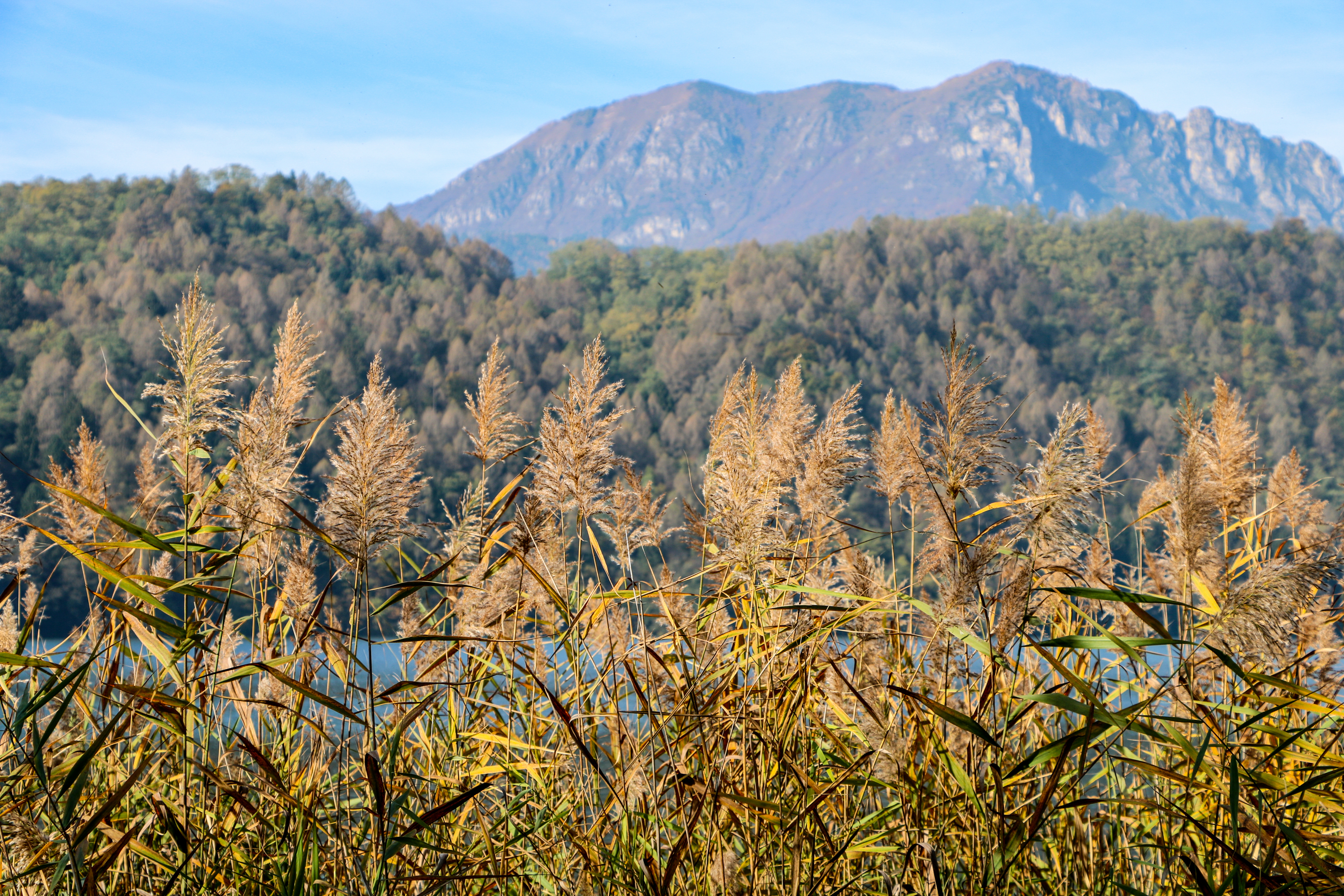 Canneto di Levico (Q47517206)